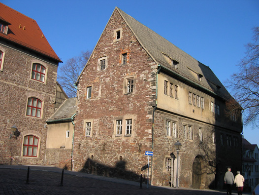 Lutherstadt Eisleben: Alte Superintendentur